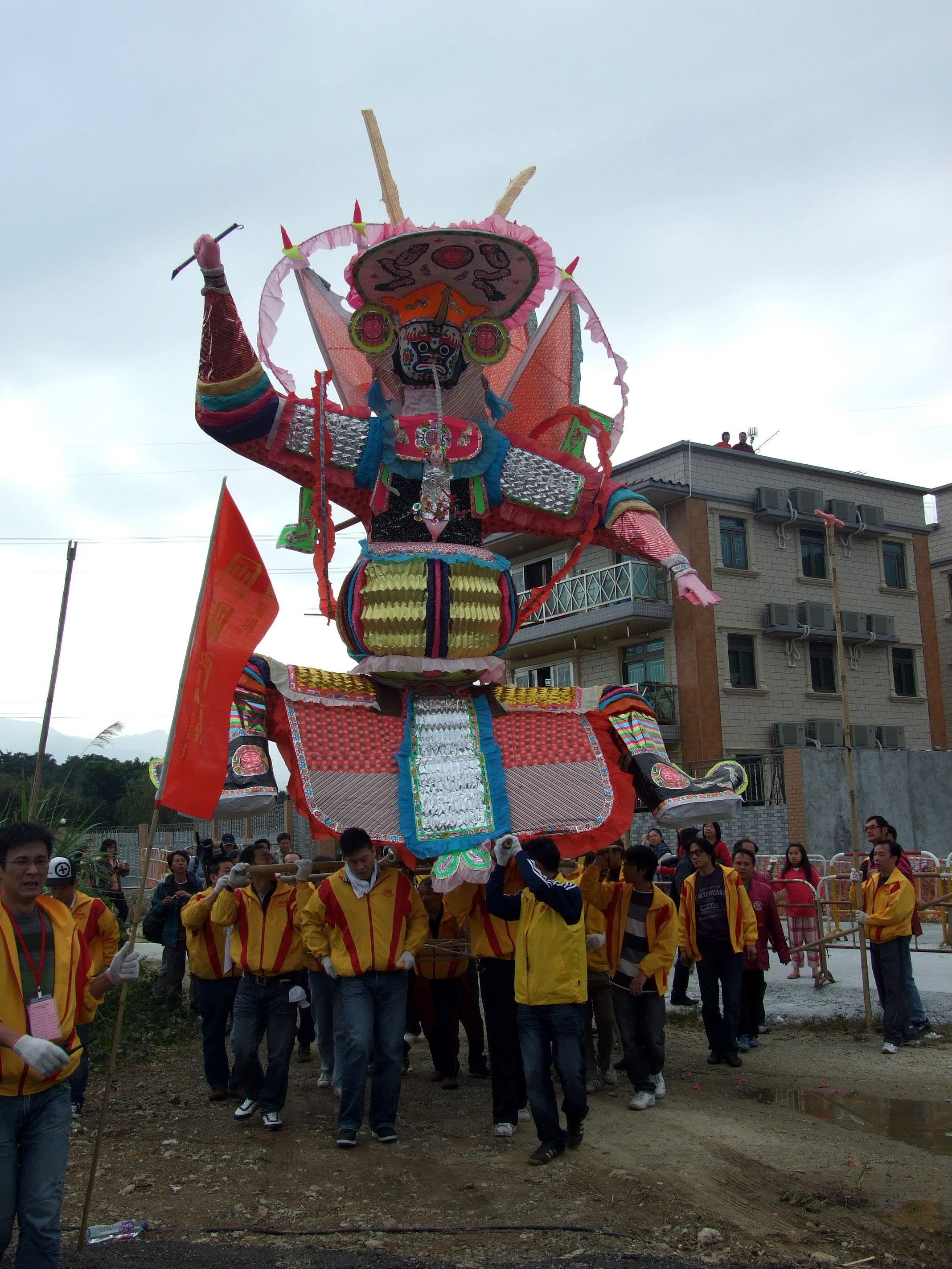 中文（香港）: 泰亨鄉太平清醮大士出巡